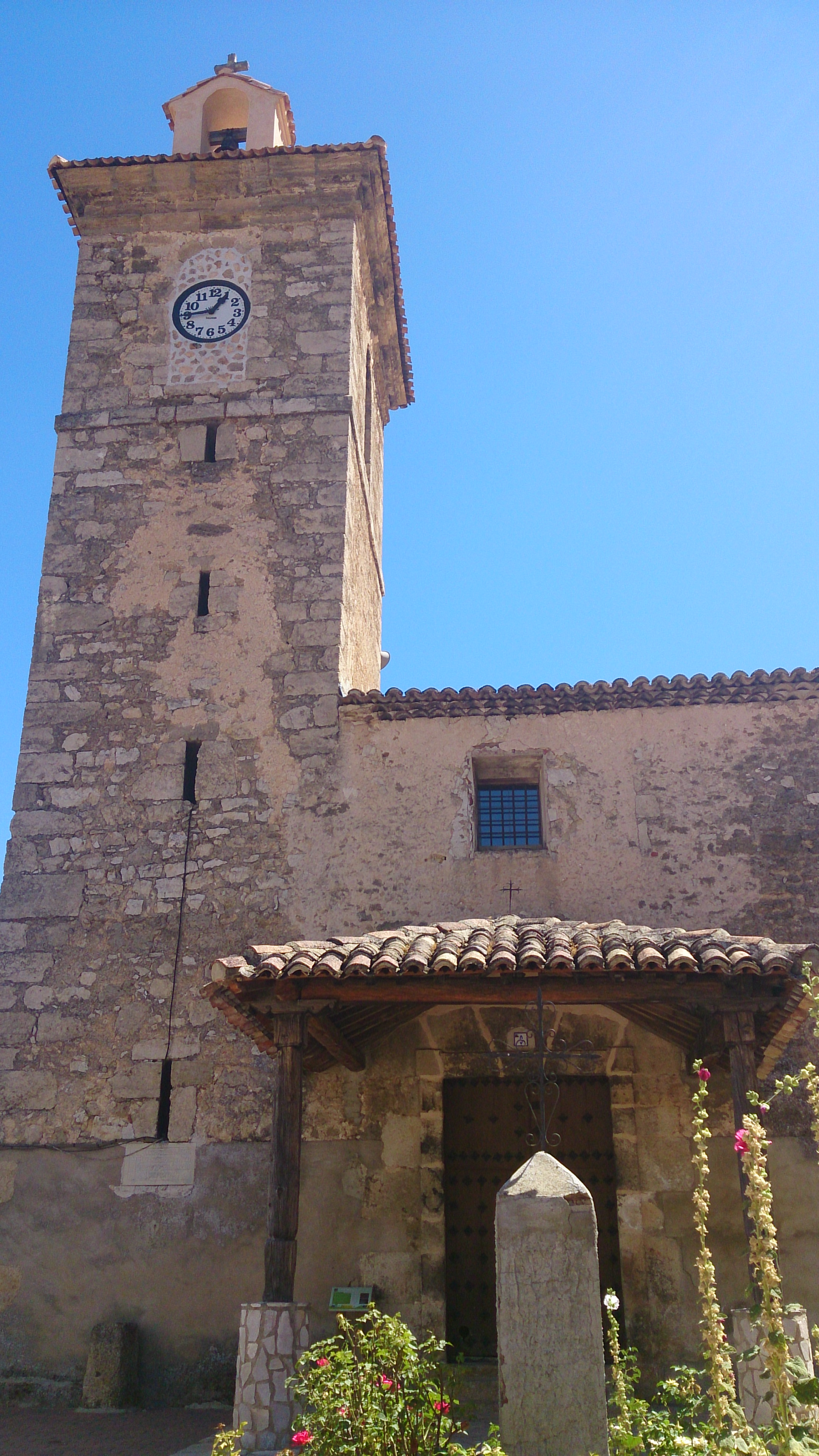 iglesia dedicada al culto de San Martín Obispo y la Virgen del Rosario.